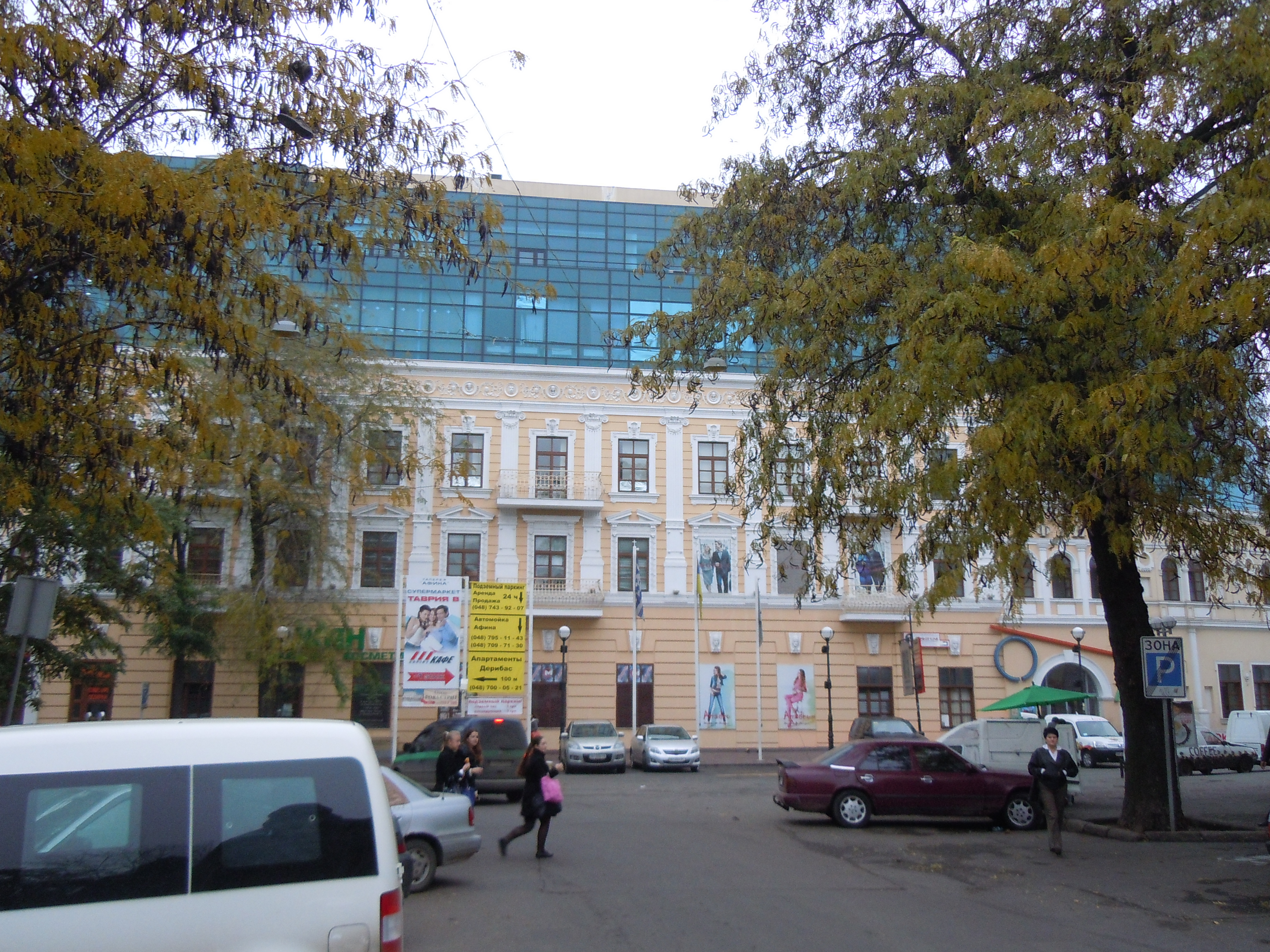 Вигляд на Круглий будинок із боку Грецької вулиці